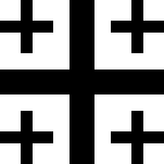 Logo des Deutschen evangelischen Kirchentags: U+2629